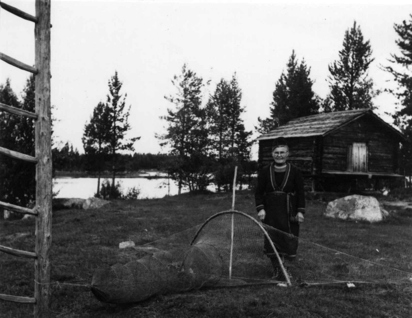 En person ved en ruse med ledearmer. I bakgrunnen et uthus. Rusen er gammel, kjøpt av en skogslapp i Malmesjaure. Abraure 1948.